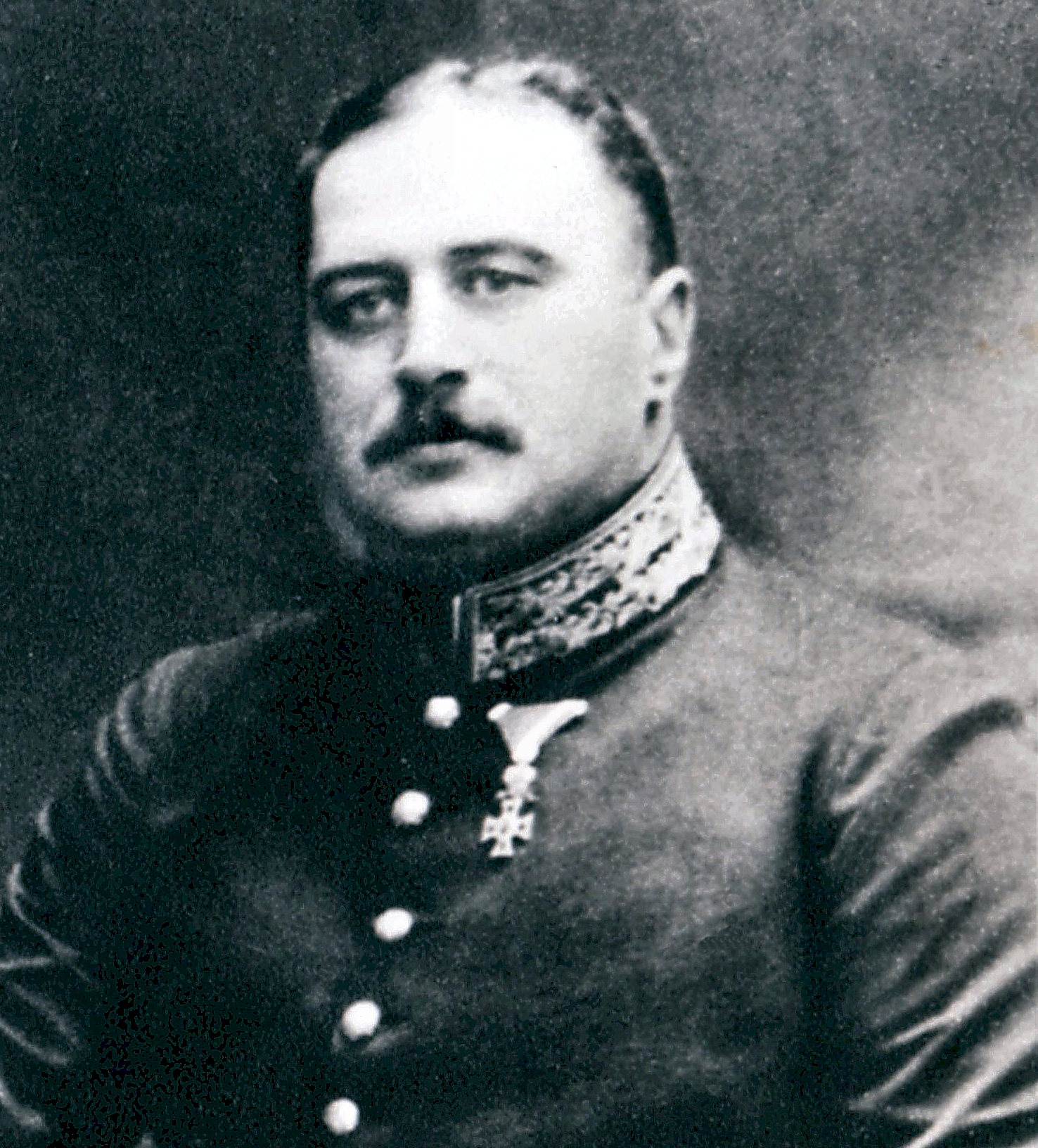 Georg Wassilko von Serecki um 1905, Landeshauptmann (Ausschnitt)